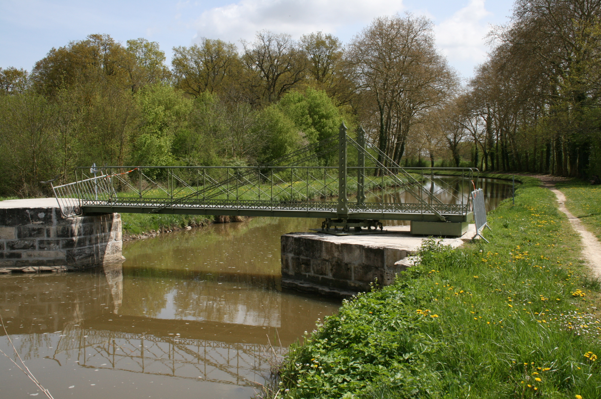 Canal d’Orléans. Pont tournant de Chevillon-sur-Huillard, Loiret, Centre, France